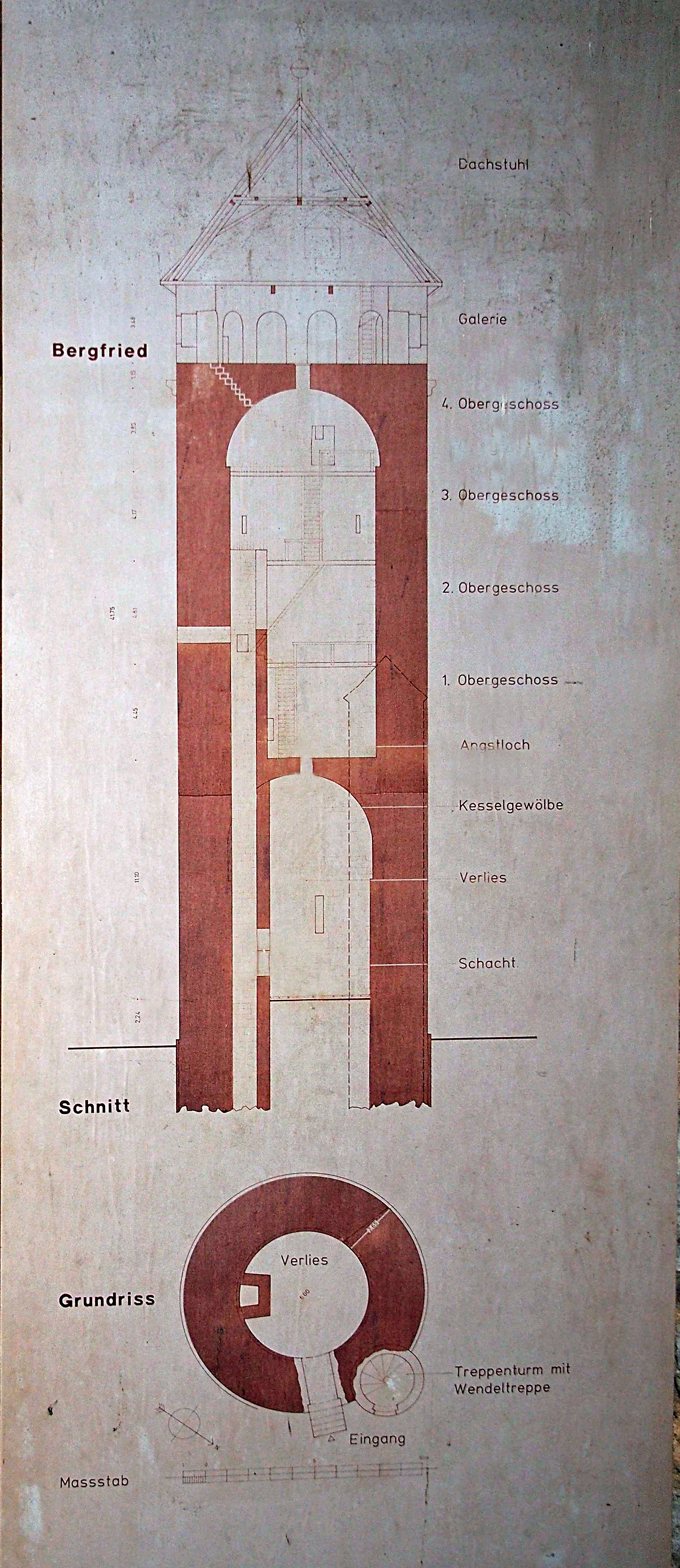 Längsschnitt und Grundriss des Bergfried auf der Festung Marienberg (Würzburg)